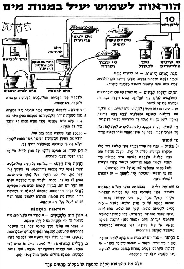 הוראות לשימוש יעיל במים